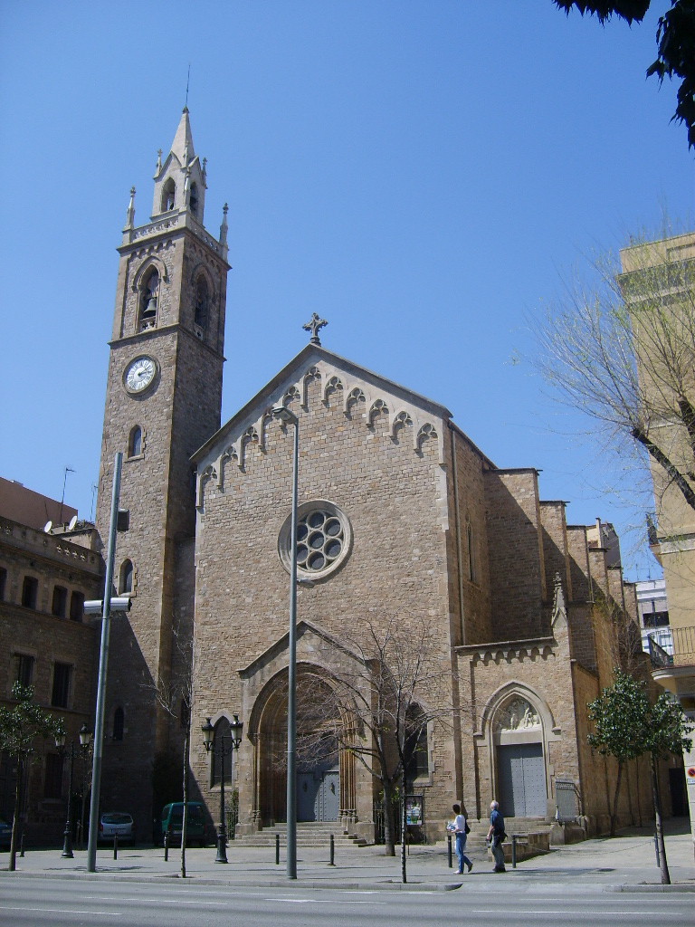 Antic monestir de Jonqueres, actual parròquia de la Concepció (Barcelona)